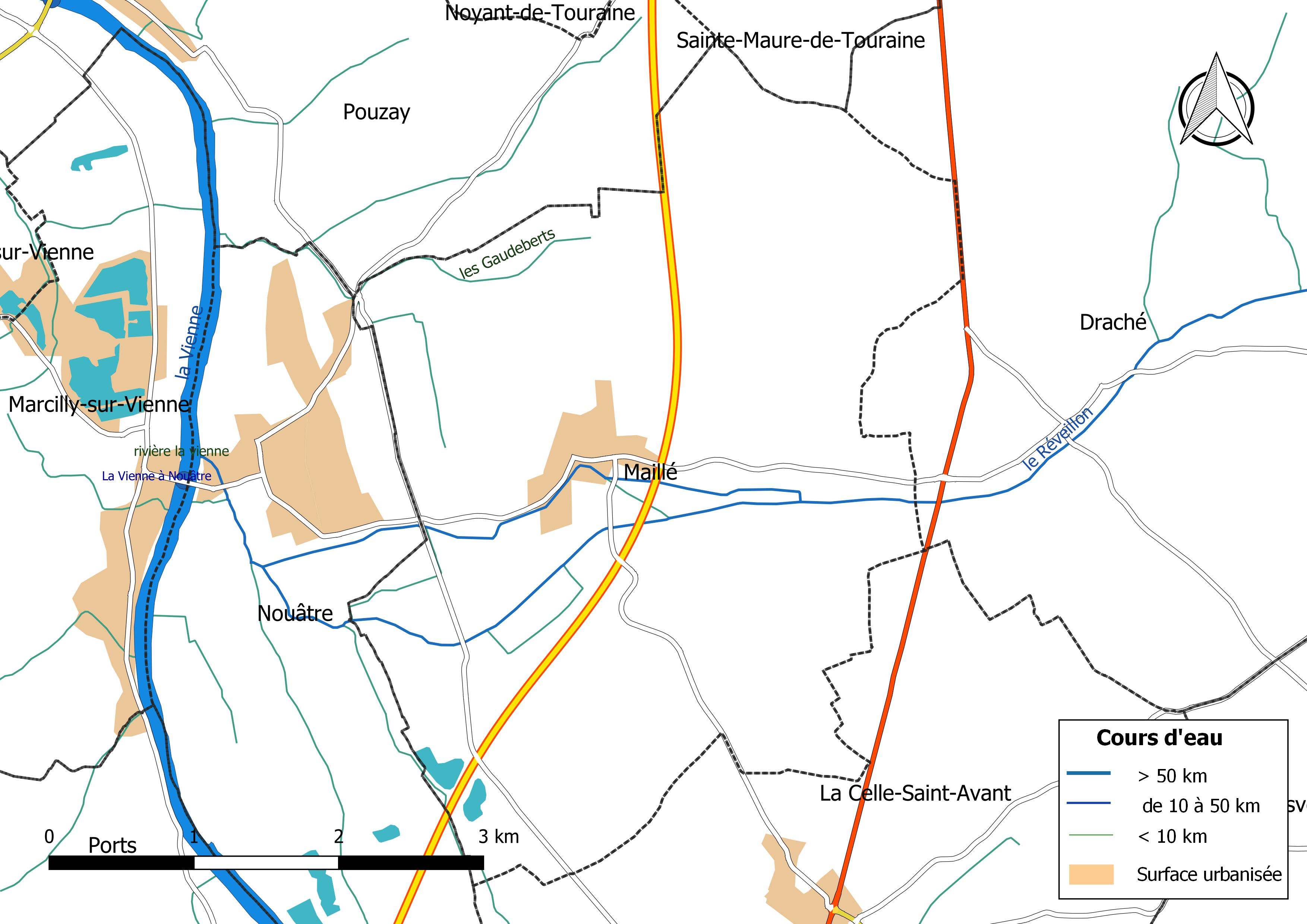 Carte du réseau hydrographique de la commune de Maillé (Indre-et-Loire) (France).